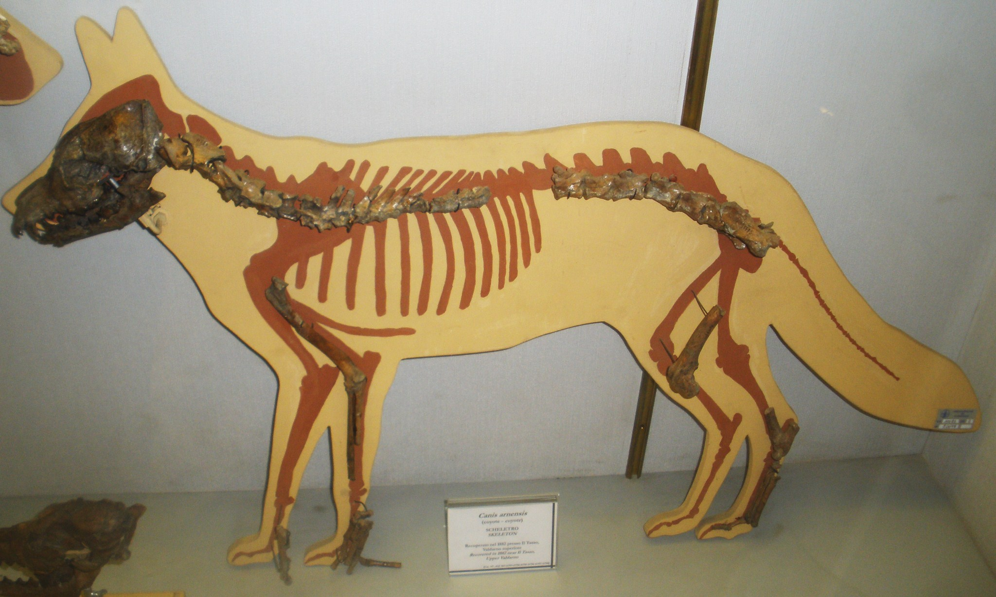 Fossil of Canis arnensis, an extinct mammal - Took the picture at Museo di Paleontologia di Firenze